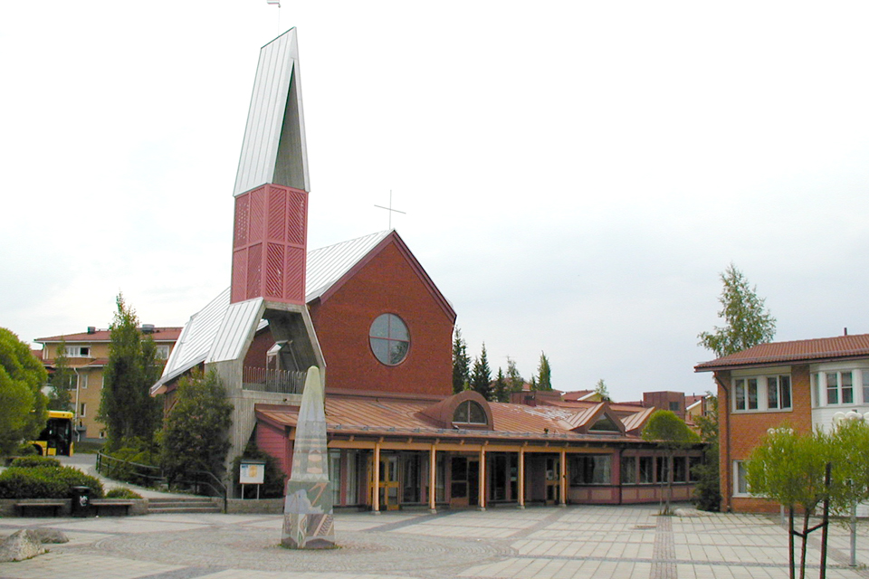 Torget, Torvalla centrum, i förgrunden.